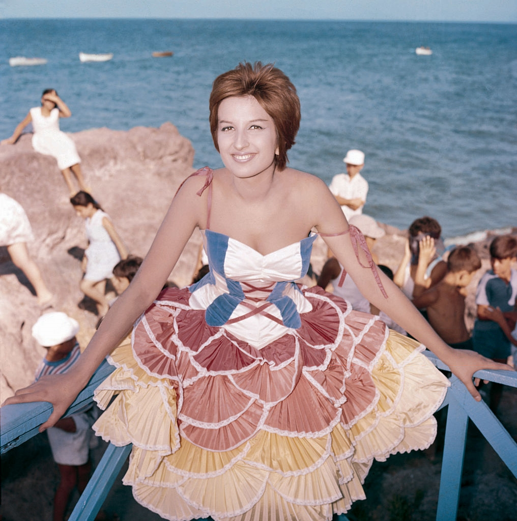 Italian singer Mina (Mina Anna Maria Mazzini)